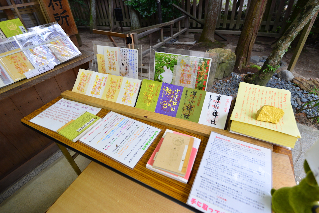 日本宇治上神社授予的单页形式的御朱印，御朱印主题色彩因季节而不同。